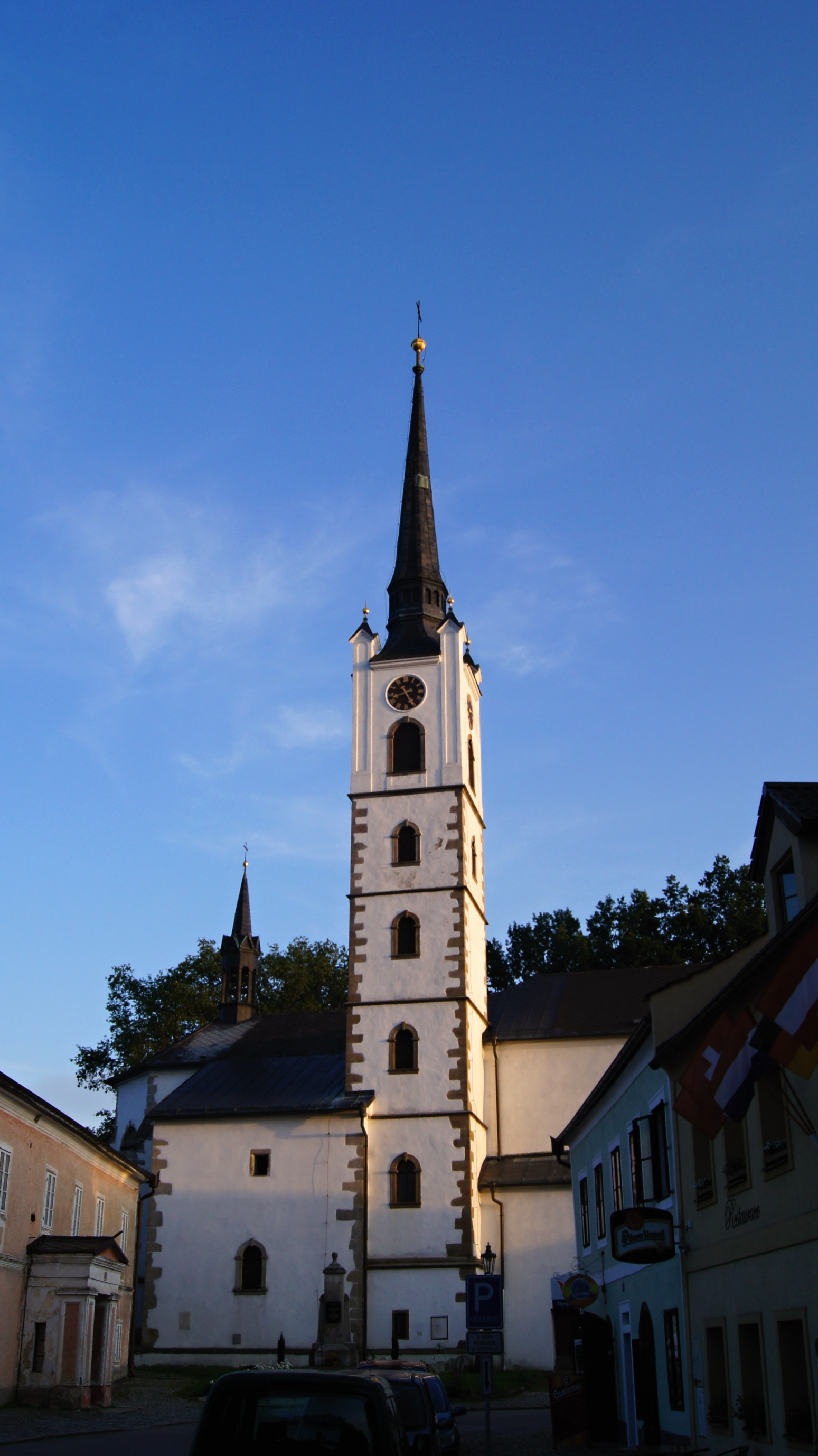 kostel sv. Bartoloměje